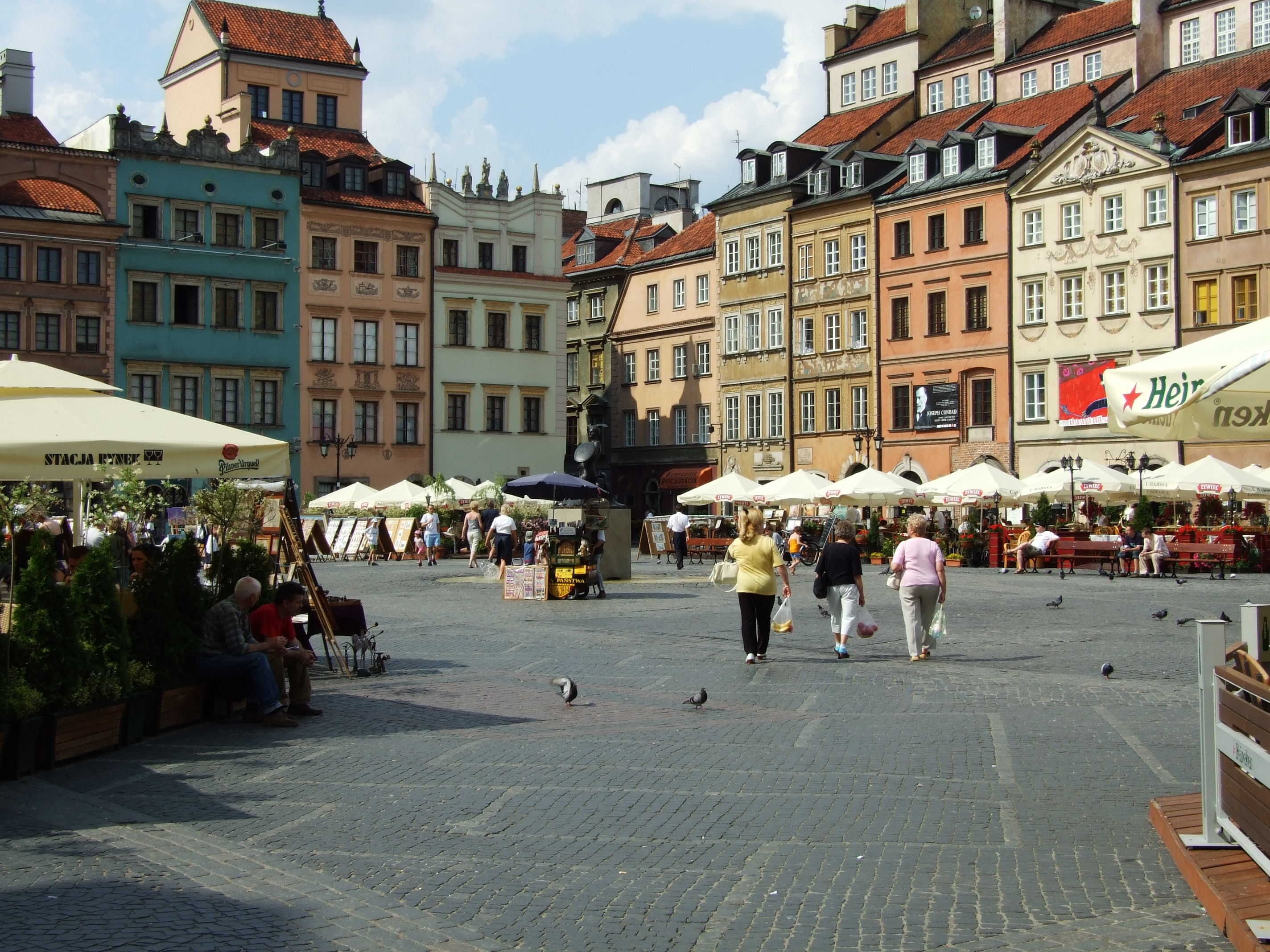 Warszawa -Starówka / Rynek